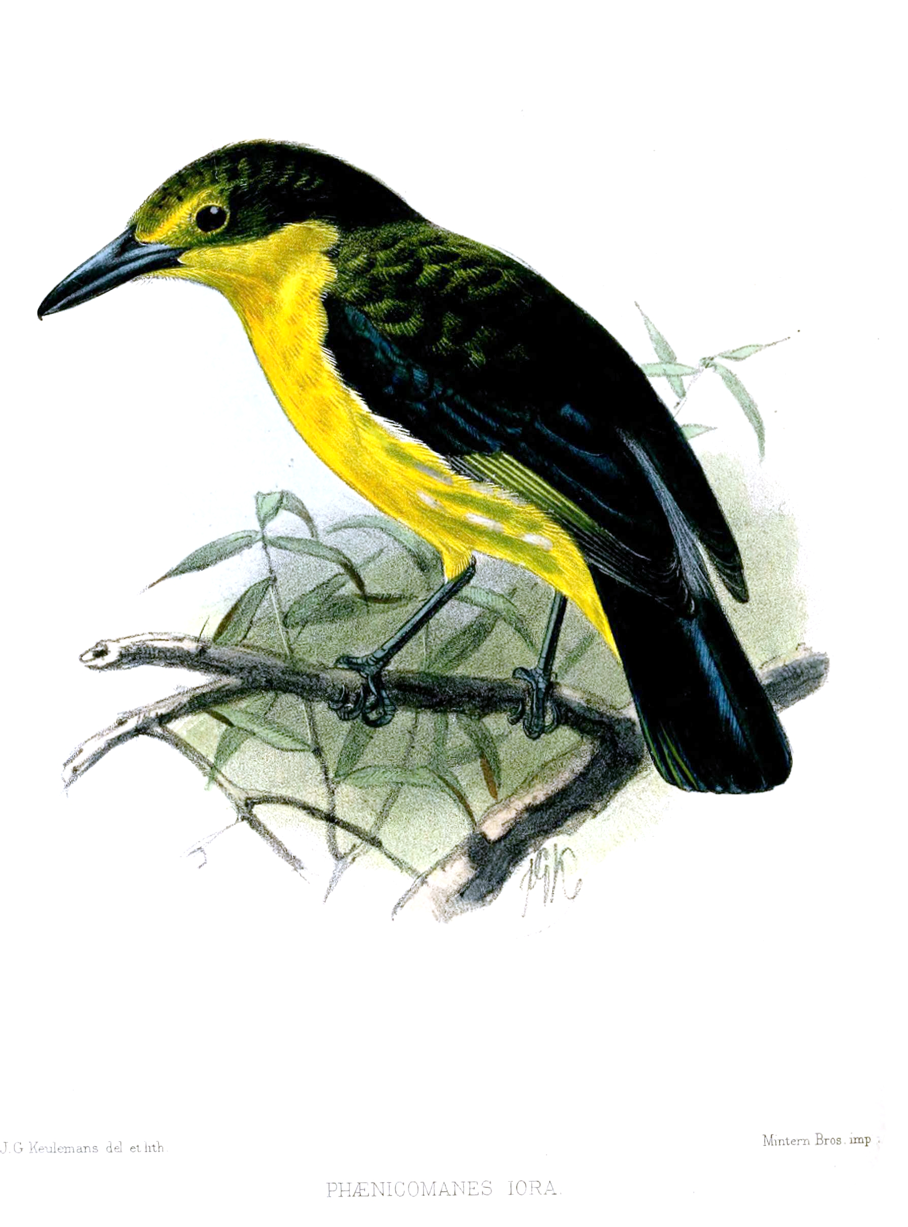 Phaenicomanes iora = Aegithina lafresnayei innotata[1] [2]